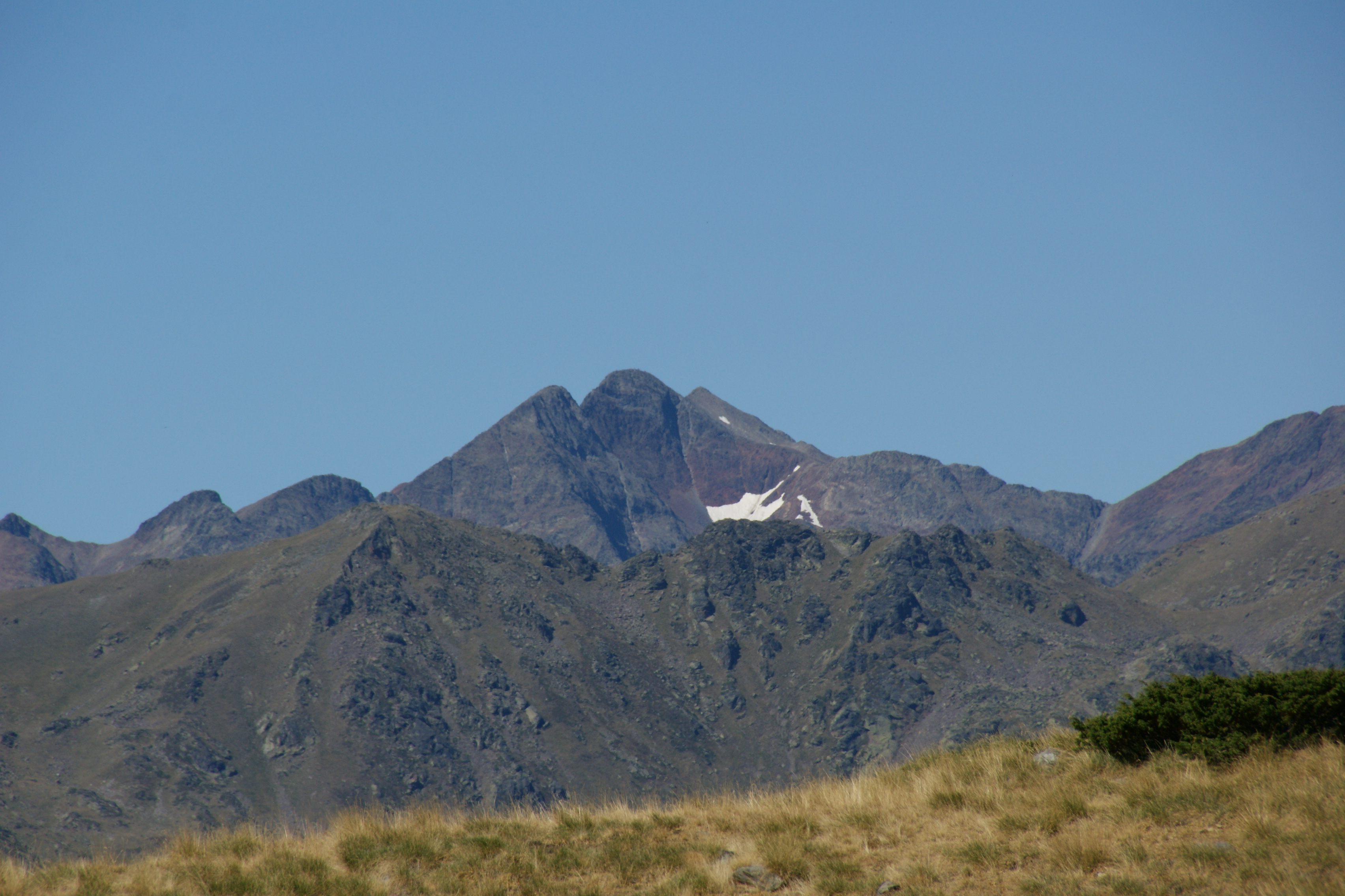 Pica d'Estats This is a a photo of an emblematic summit in Catalonia, Spain, with id: CE-271064006